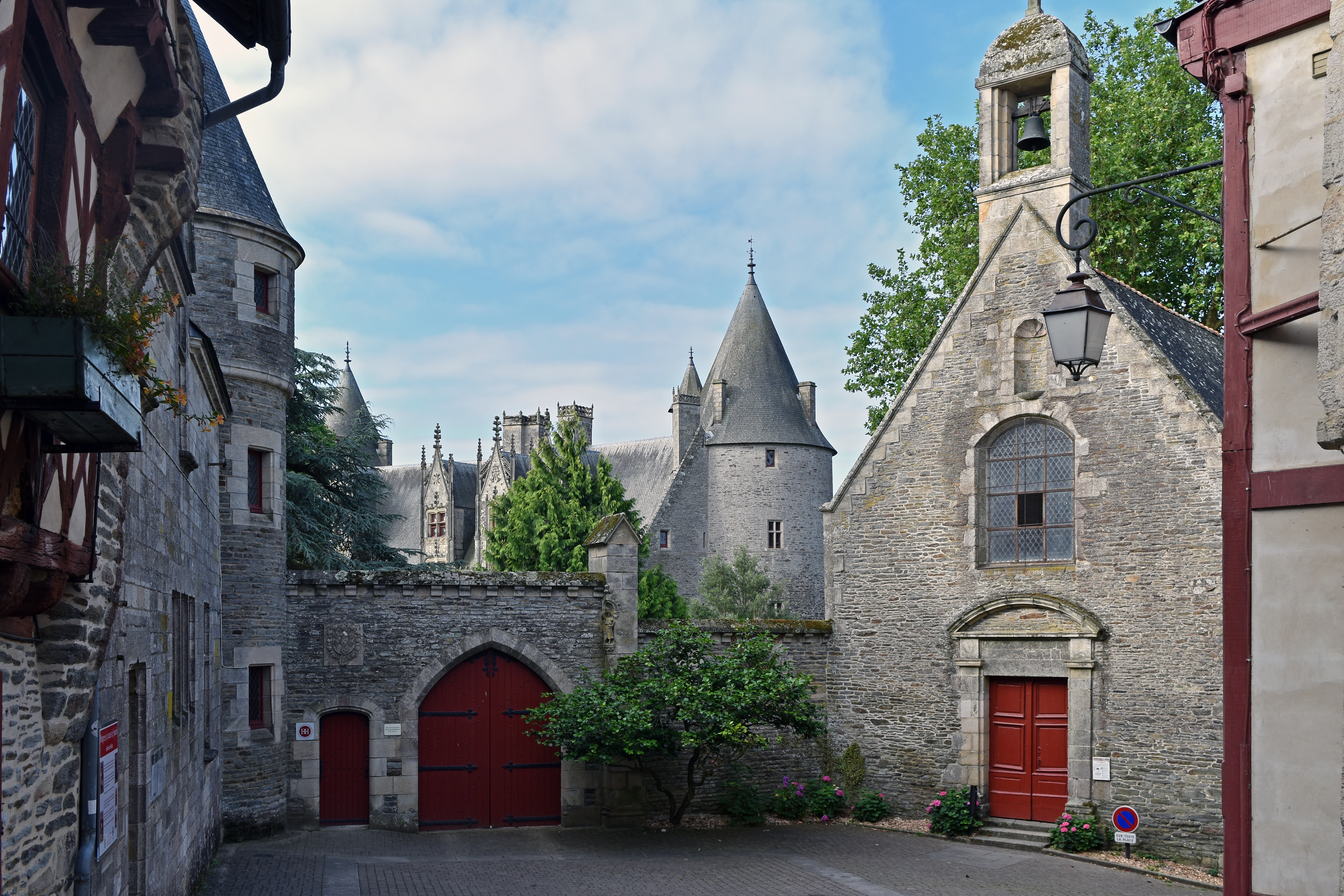 Chateau de Josselin, Morbihan, France .